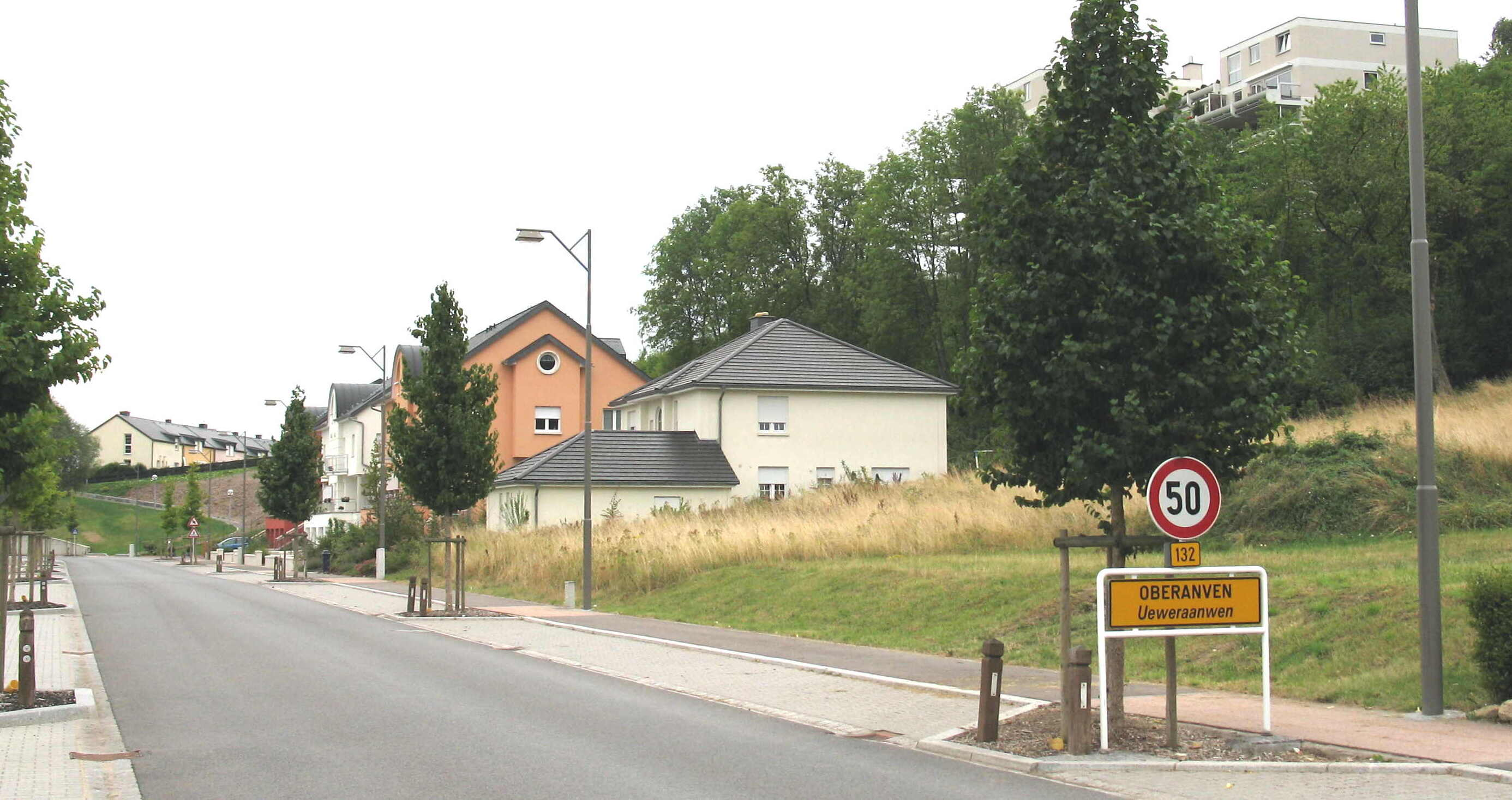 Ueweraanwen